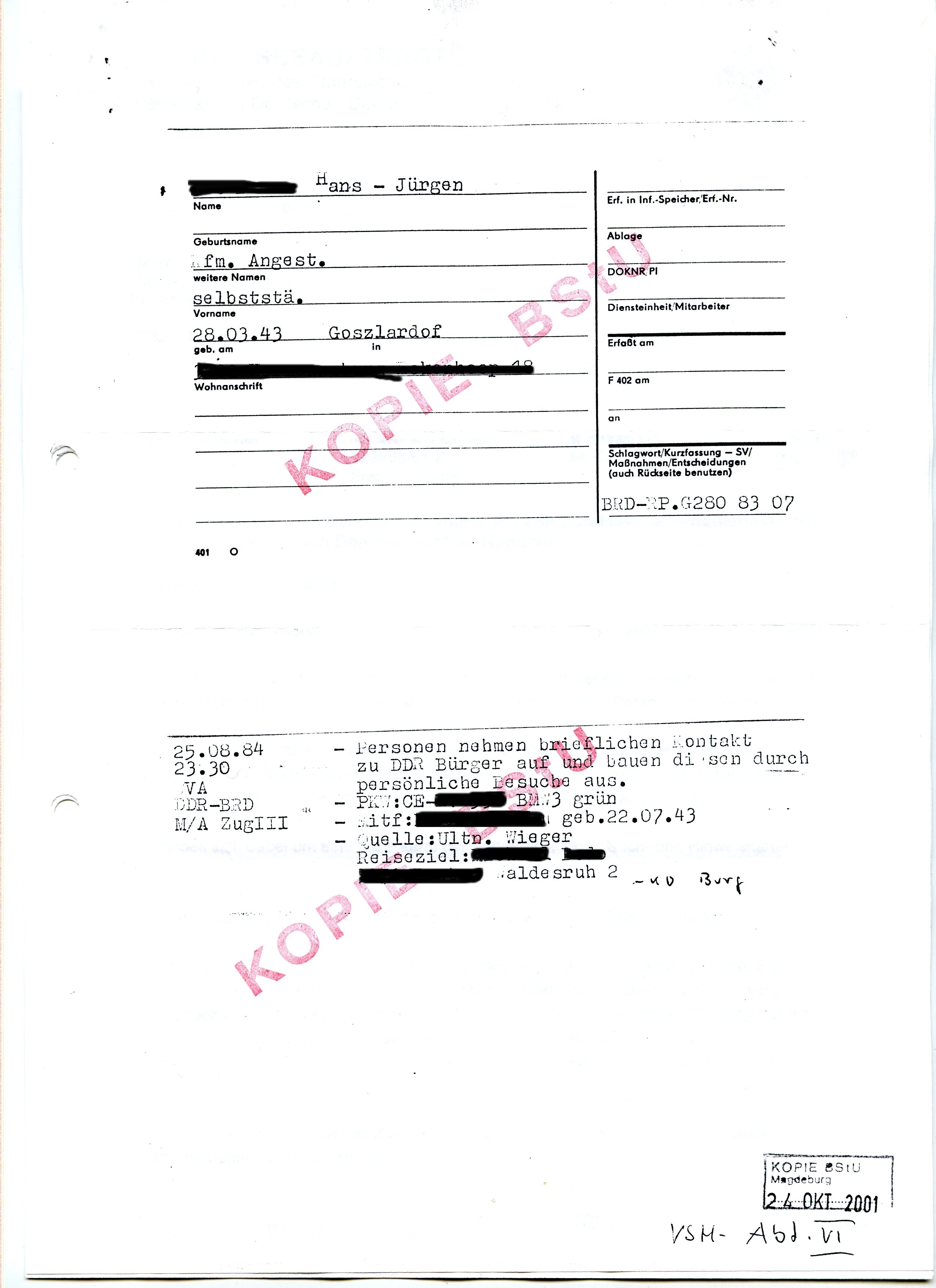 Kopie einer Auskunft der Behörde der Bundesbeauftragten für die Unterlagen des Staatssicherheitsdienstes (BStU)